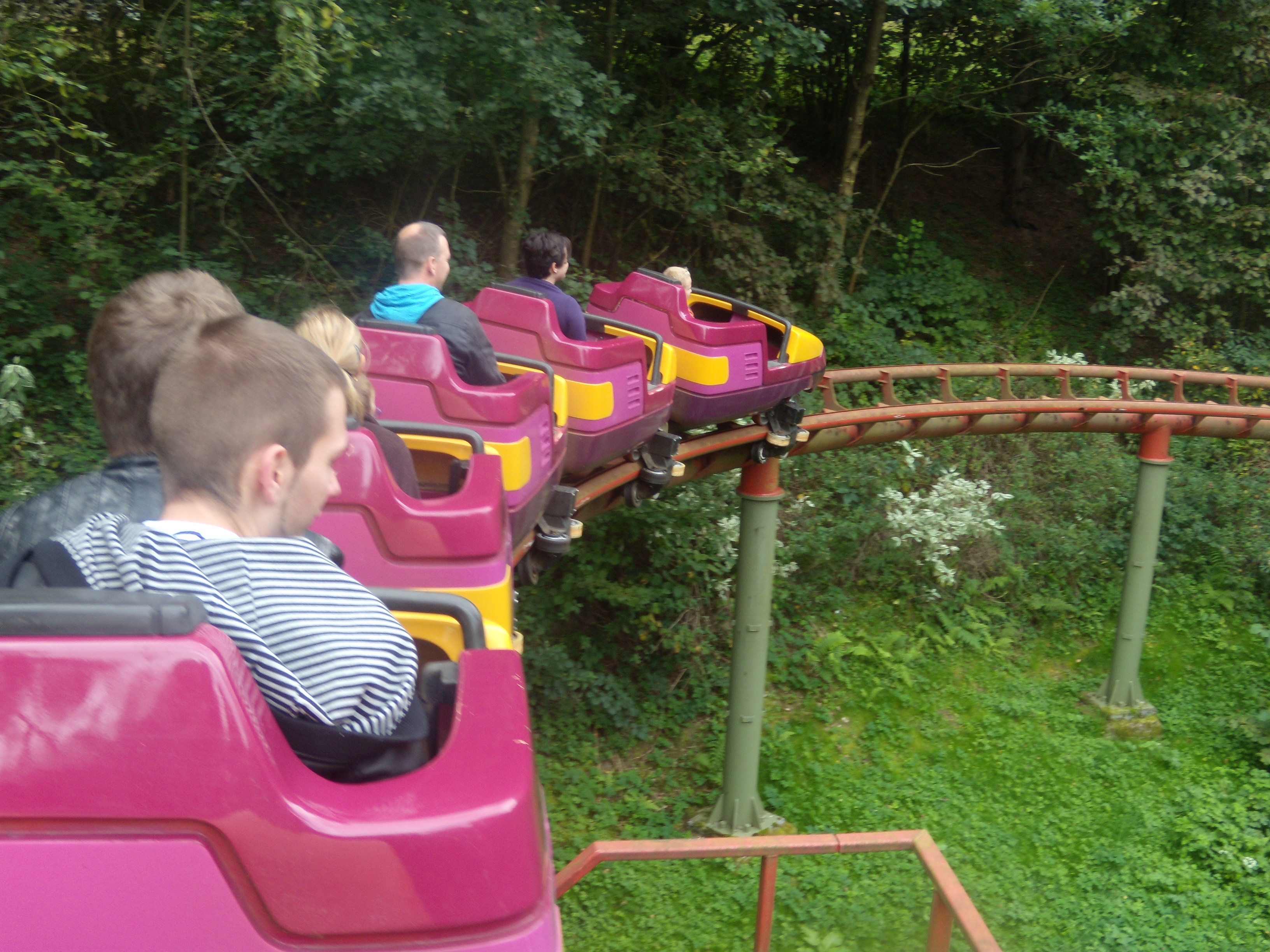 Montagnes russes Coaster à Plopsa Coo, Belgique.